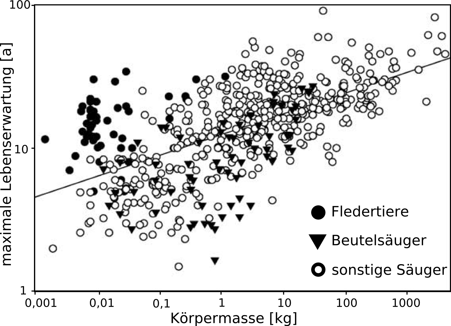 Die Abhängigkeit der maximalen Lebenserwartung von in Gefangenschaft gehaltenen Säugetieren von ihrer Körpermasse. Daten (Source) von S. N. Austad: Diverse aging rates in metazoans: targets for functional genomics. In: Mech Ageing Dev 126, 2005, S. 43-49. PMID 15610761 (Review)